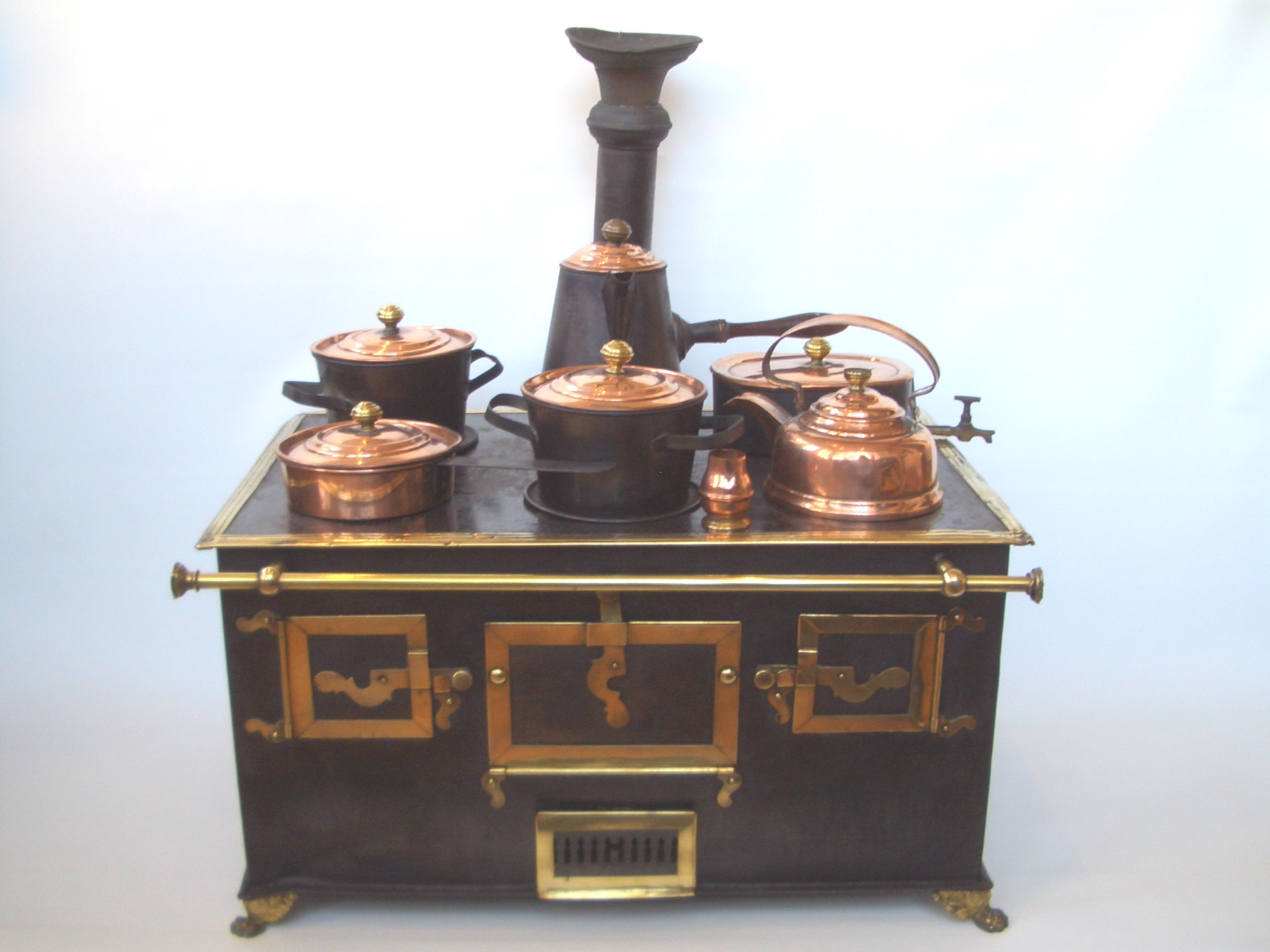 Puppenherd, Deutschland um 1900